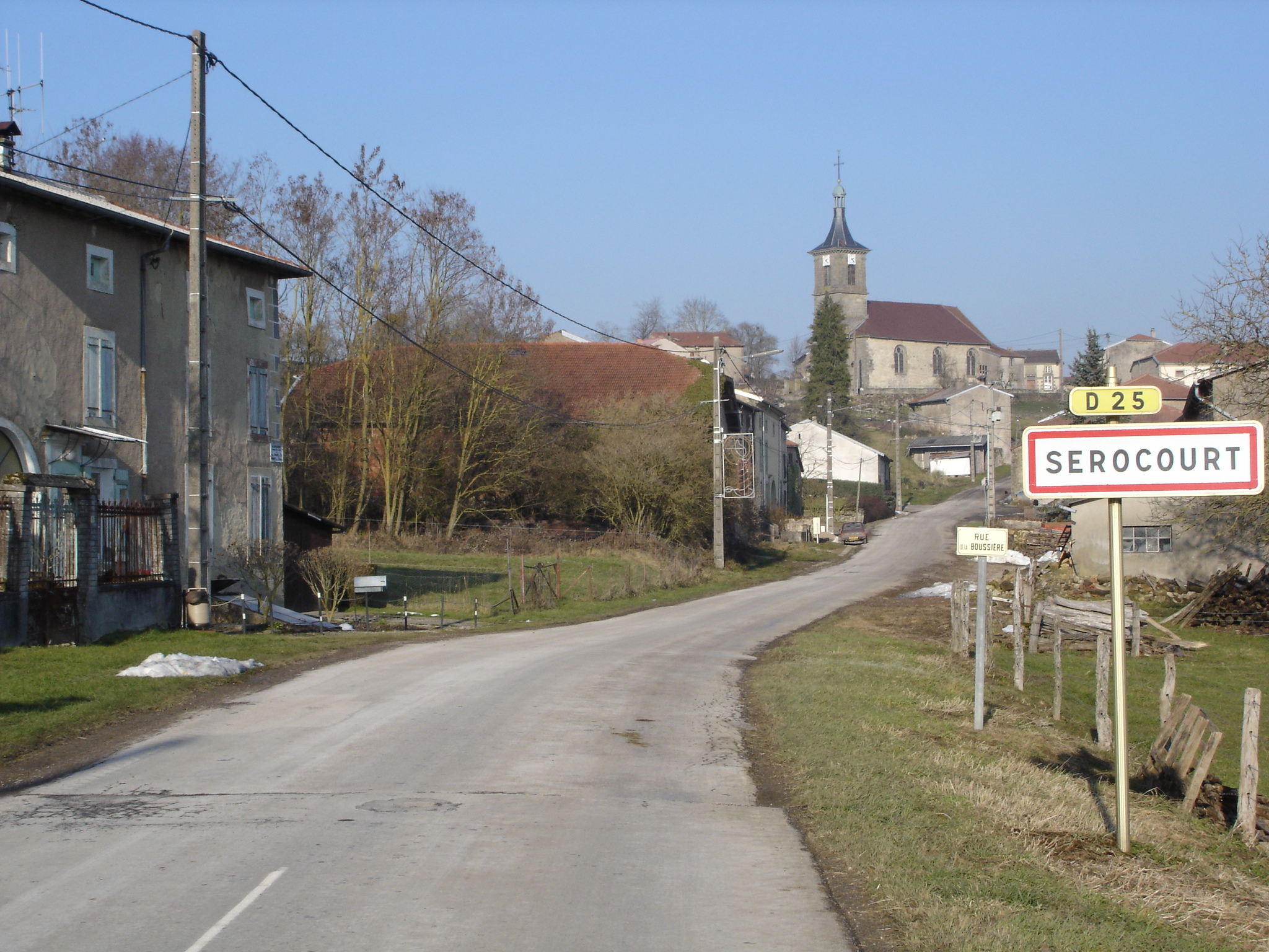 Le village de Serocourt (Vosges) -- Photo amateur prise par moi-même.